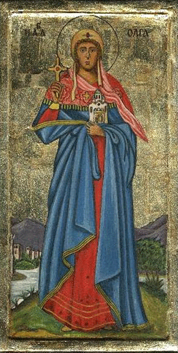 Saint Olga. Святая Ольга